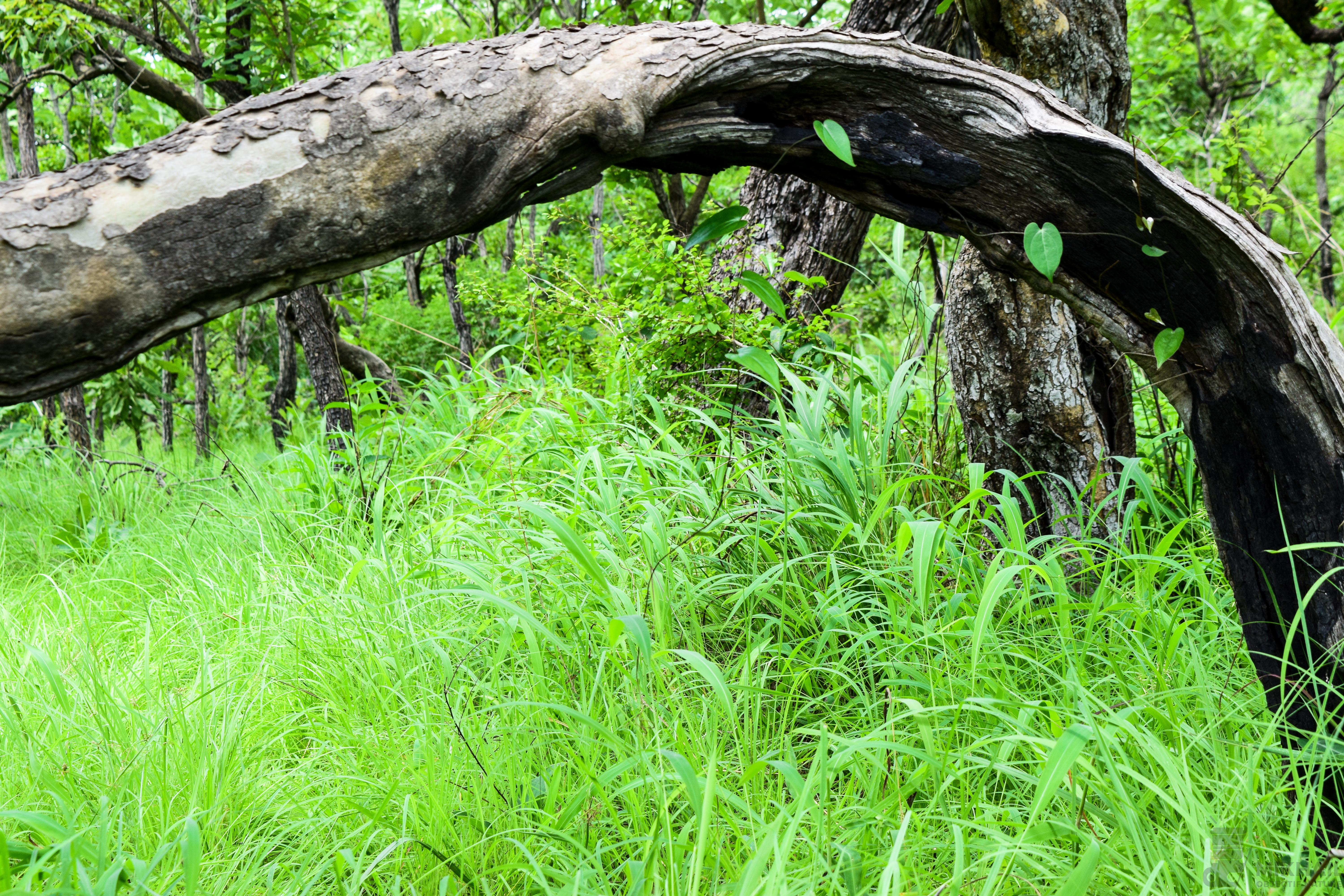 Bois arc-bouté dans le pâturage naturel de Samiondji (Covè)